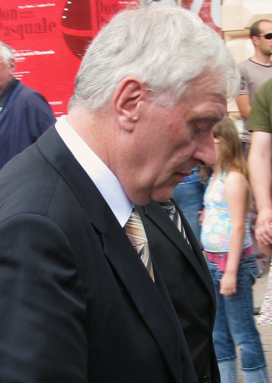 Josip Friščić